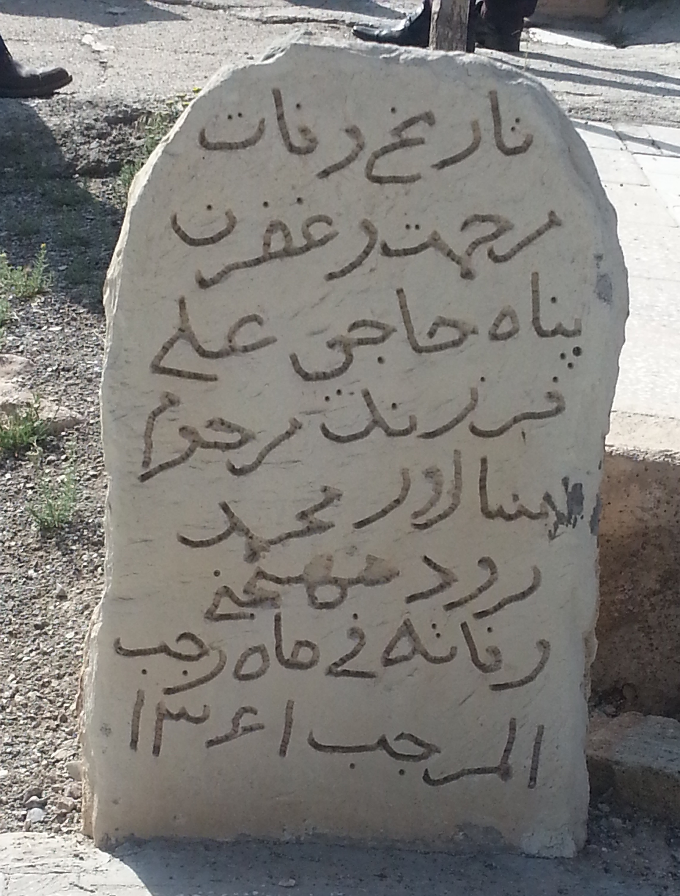 سنگ قبر 1361ق